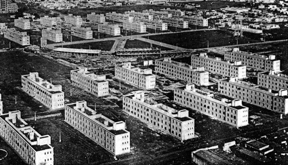 Vista general de las obras del Barrio Los Perales (luego llamado "Manuel Dorrego"), construido entre 1947 y 1949 en Mataderos, Ciudad de Buenos Aires, Argentina. Parte del Plan Eva Perón de Vivienda